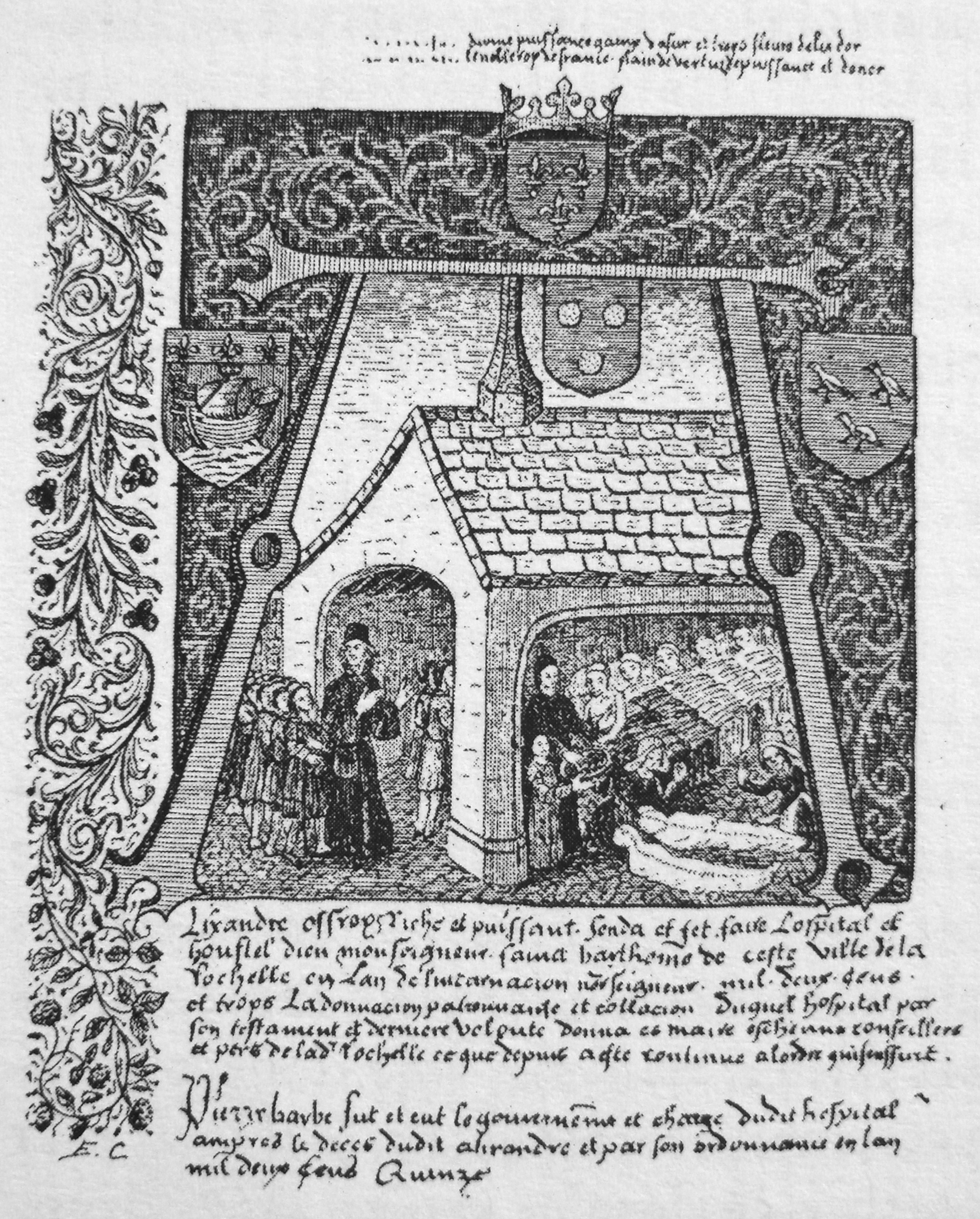 Frontiscipe_du_cartulaire_d_Aufredi